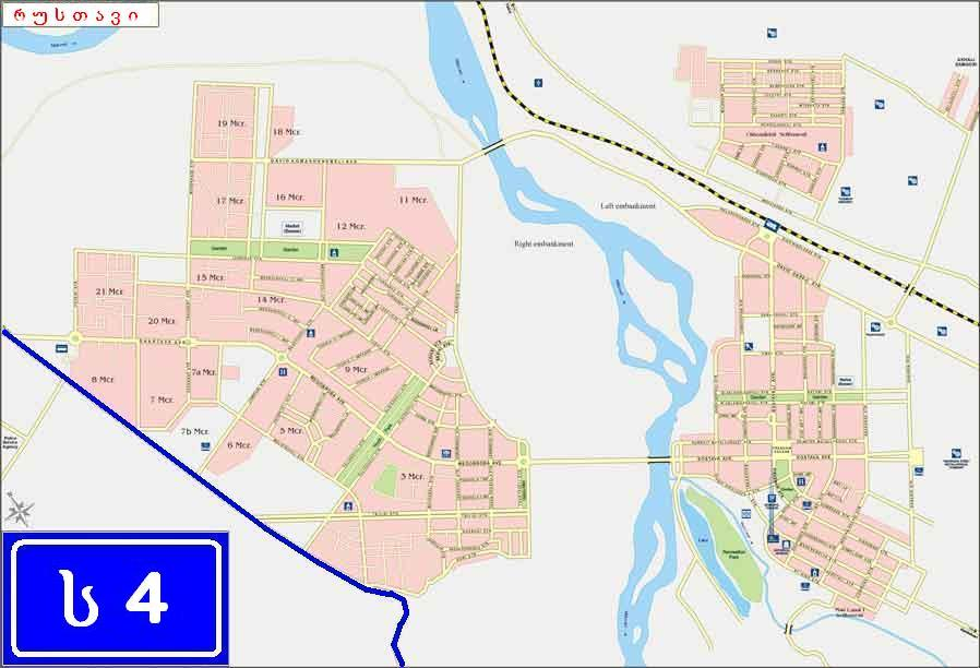 საქართველოს საავტომობილო მაგისტრალი ს4